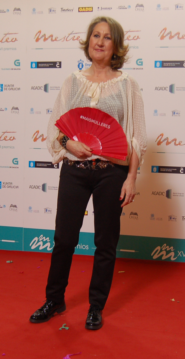 Luísa Merelas nos Mestre Mateo 2017